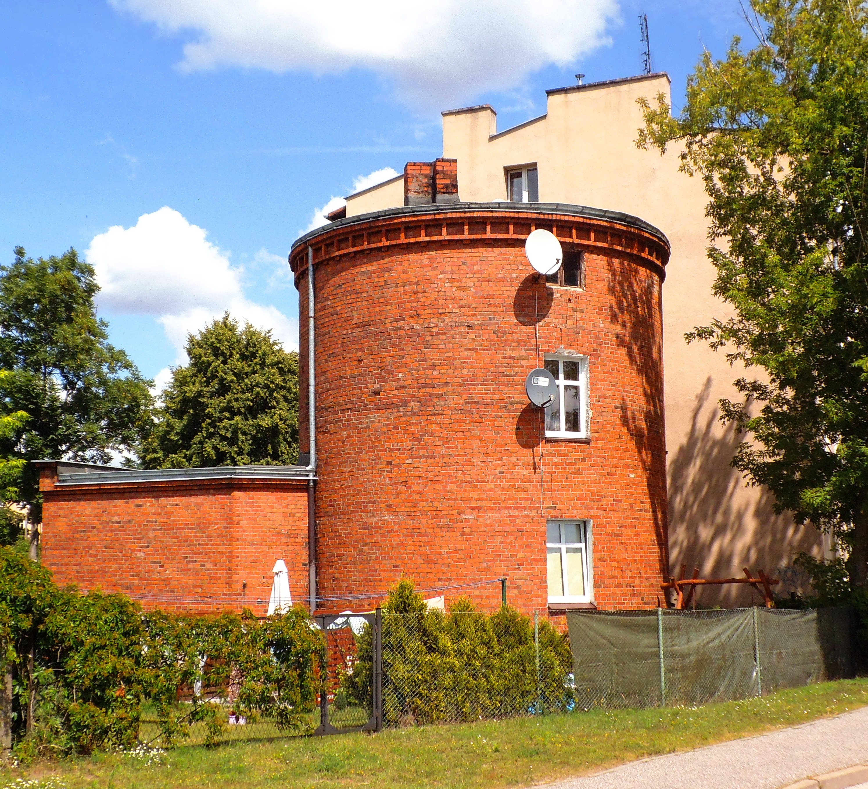 Budynek przy ul. Inowrocławskiej 12 w Toruniu